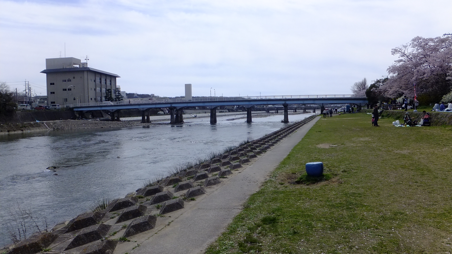 兵庫県三木市本町2丁目 美嚢川